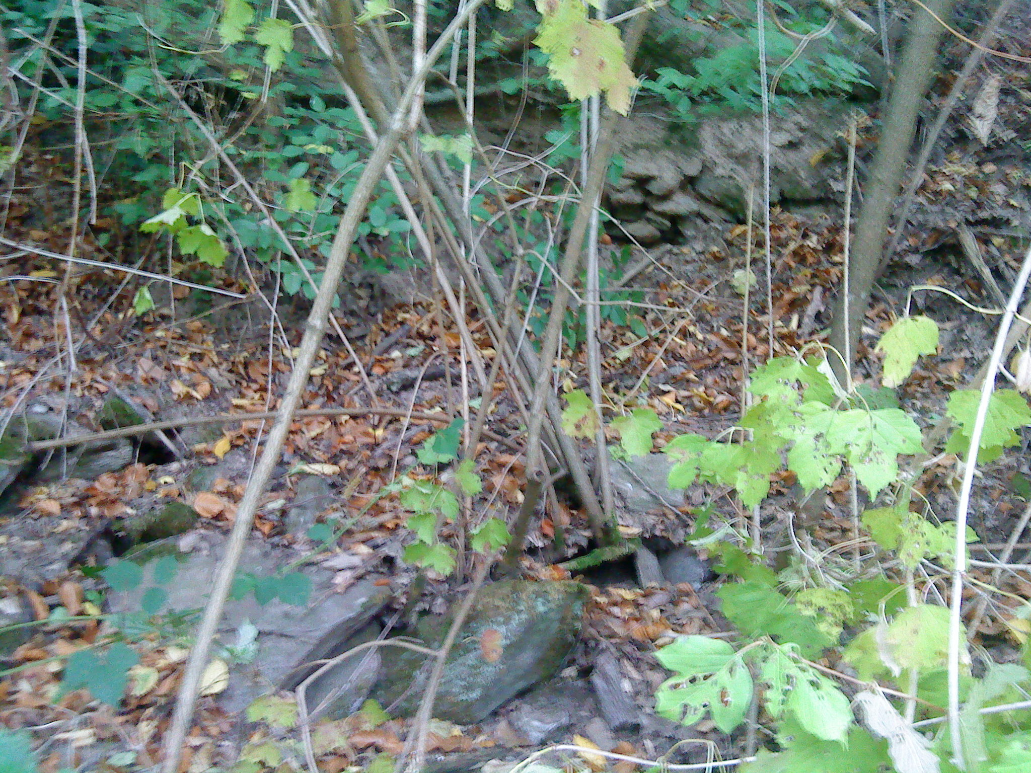 Noch zu erkennende Mauerreste am ehemaligen Rothenberger Hof zwischen Mömbris und Geiselbach